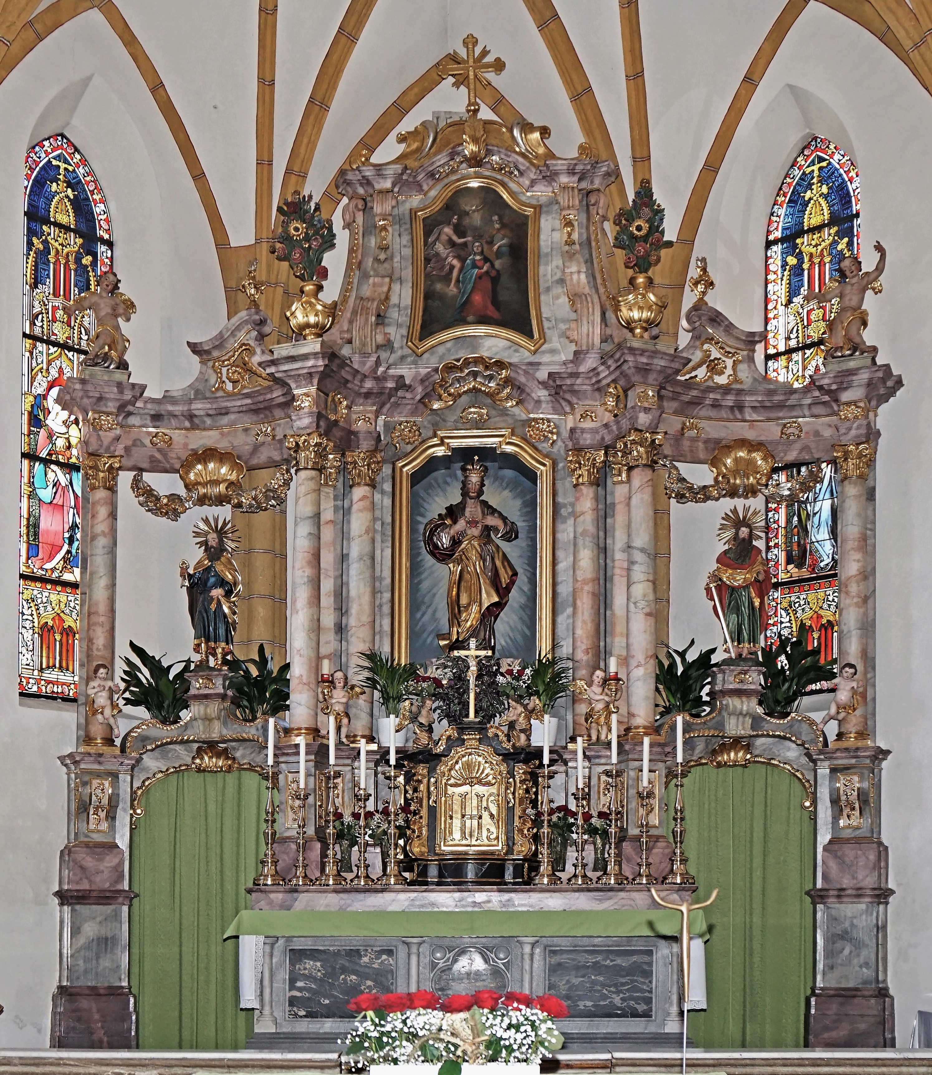 Kath. Pfarrkirche Hll. Petrus und Paulus, Bleiburg, barocker Hochaltar